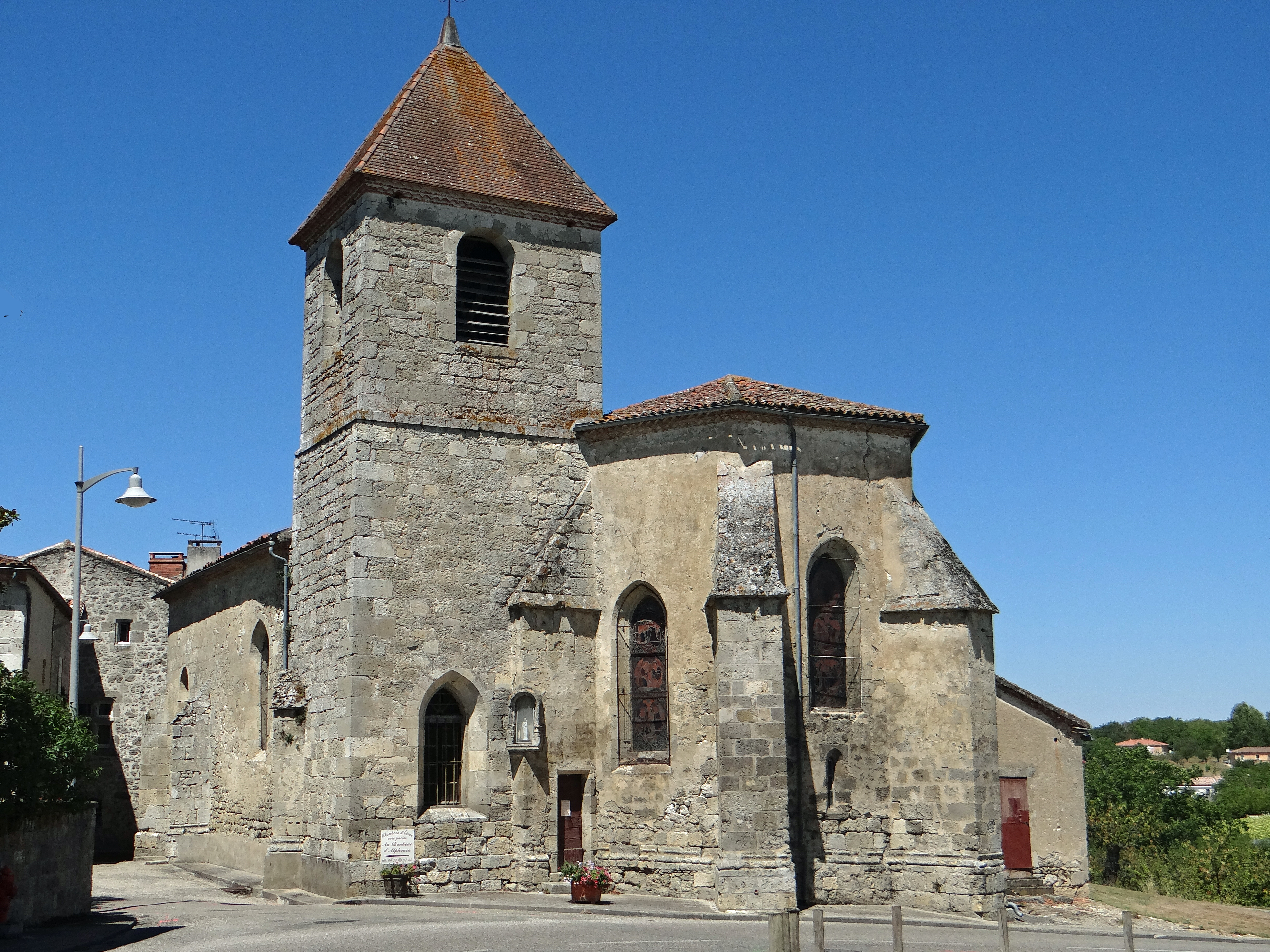 Lusignan-Petit - Église Notre-Dame - Chevet